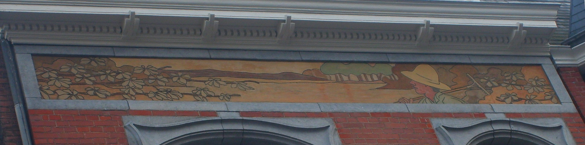 Sgraffite Le Jardinier Rue Etienne Soubre, 29 Liège